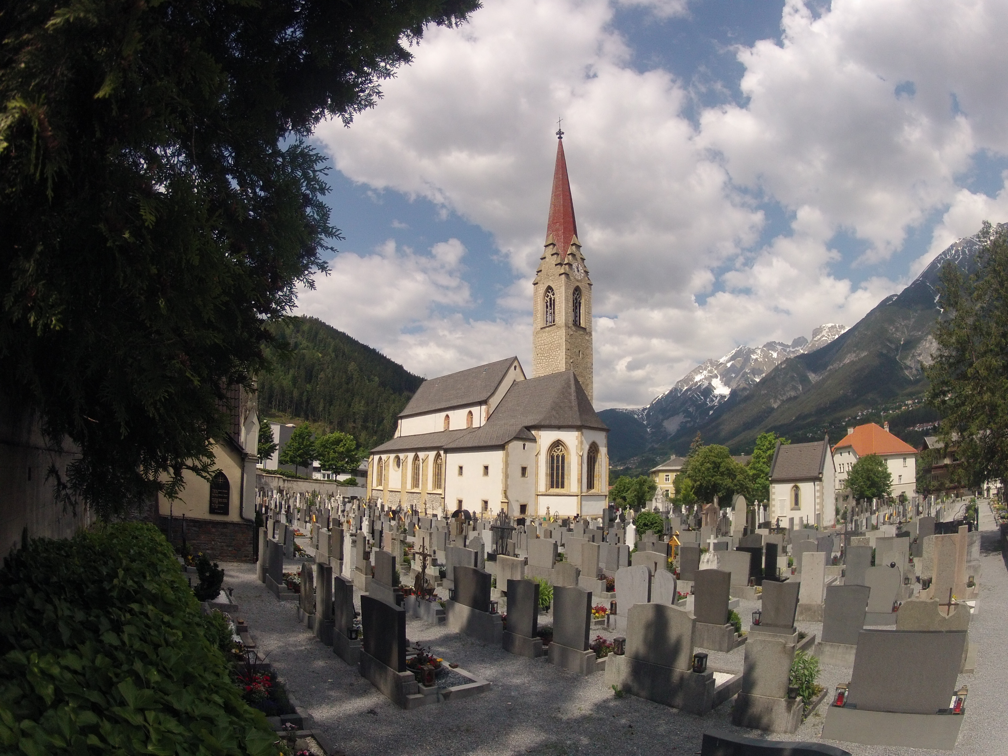 Kath. Pfarrkirche Unsere Liebe Frau Mariä Himmelfahrt mit Friedhof